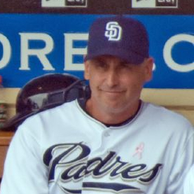 Bud Black